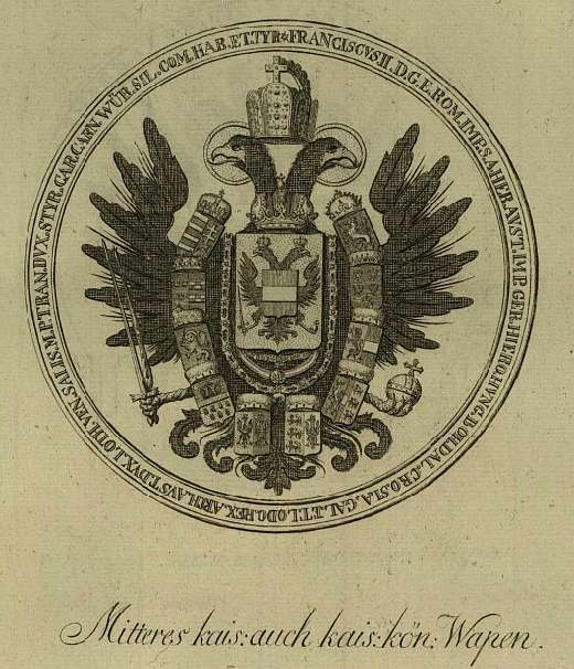 II. Ferenc osztrák császár 1804-es középcímere